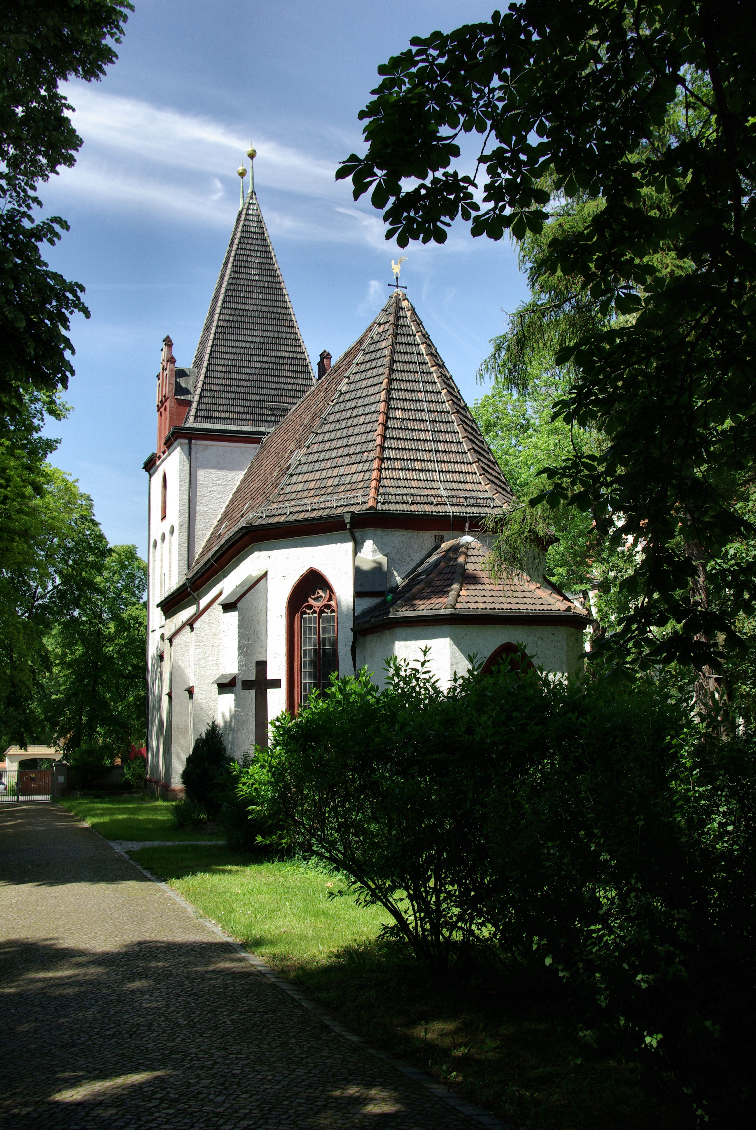 Cristuskirche in Leipzig-Eutritzsch; Christ church, Leipzig-Eutritzsch